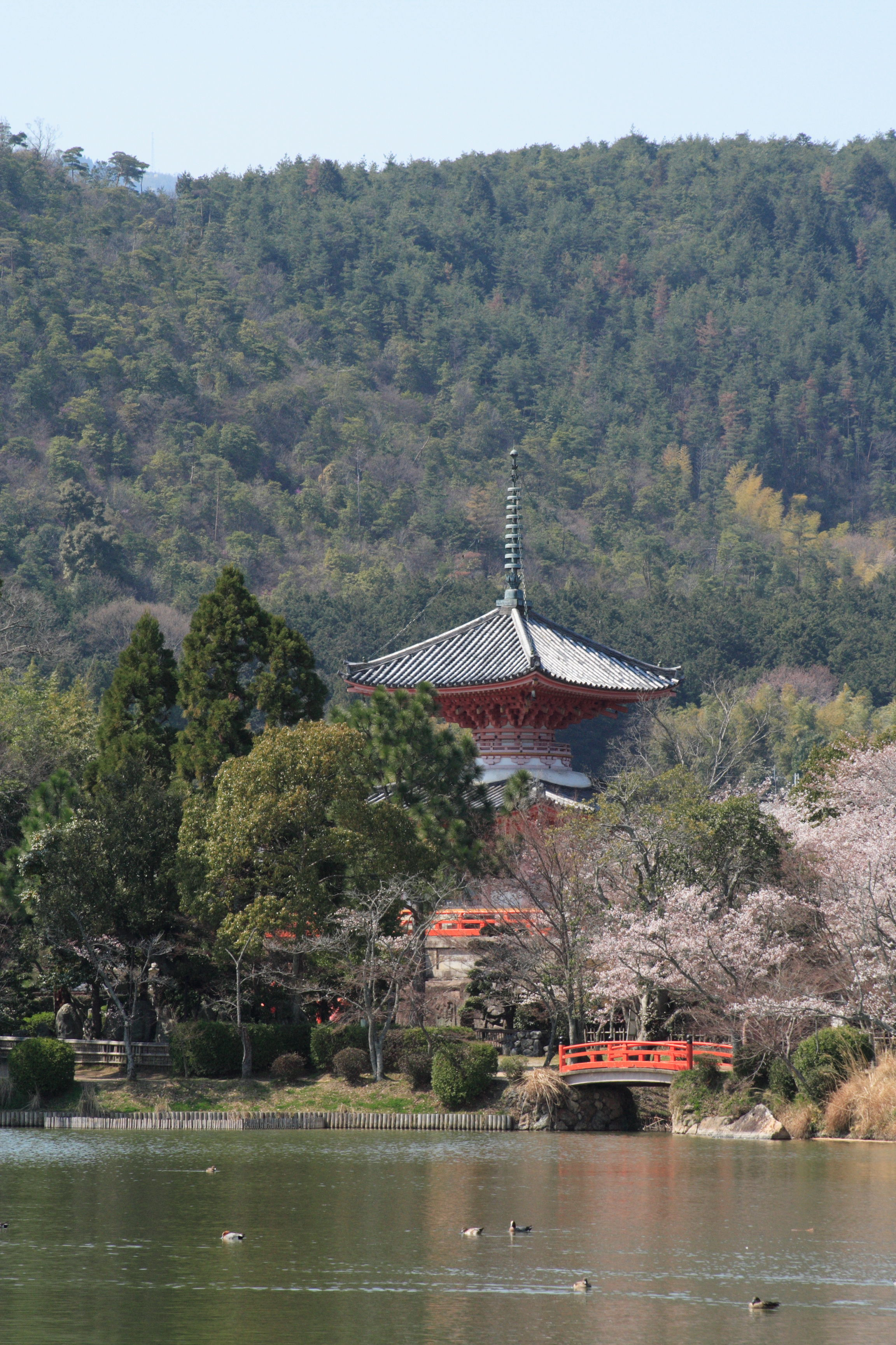 大覚寺 心経宝塔 京都市/Daikakuji Shingyō Hōtō Kyoto,Japan